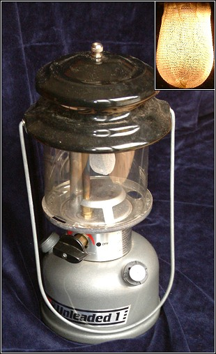 Starklichtlampe mit Glühstrumpf Urheber: Anton (rp) Winter 2004 Nutzungsrechte freigegeben.